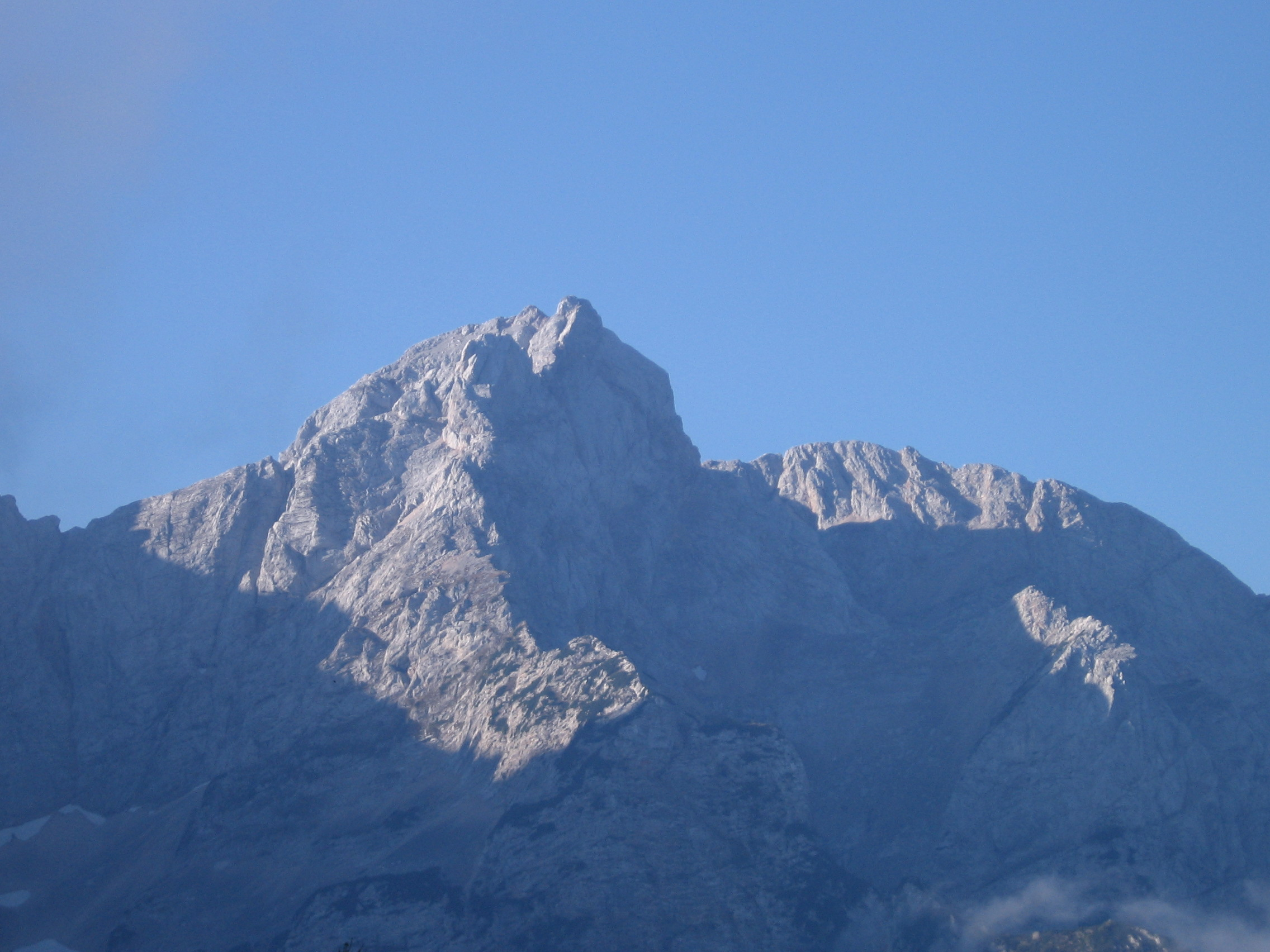 Mount Kochna, nortern side, from Jenkova planina